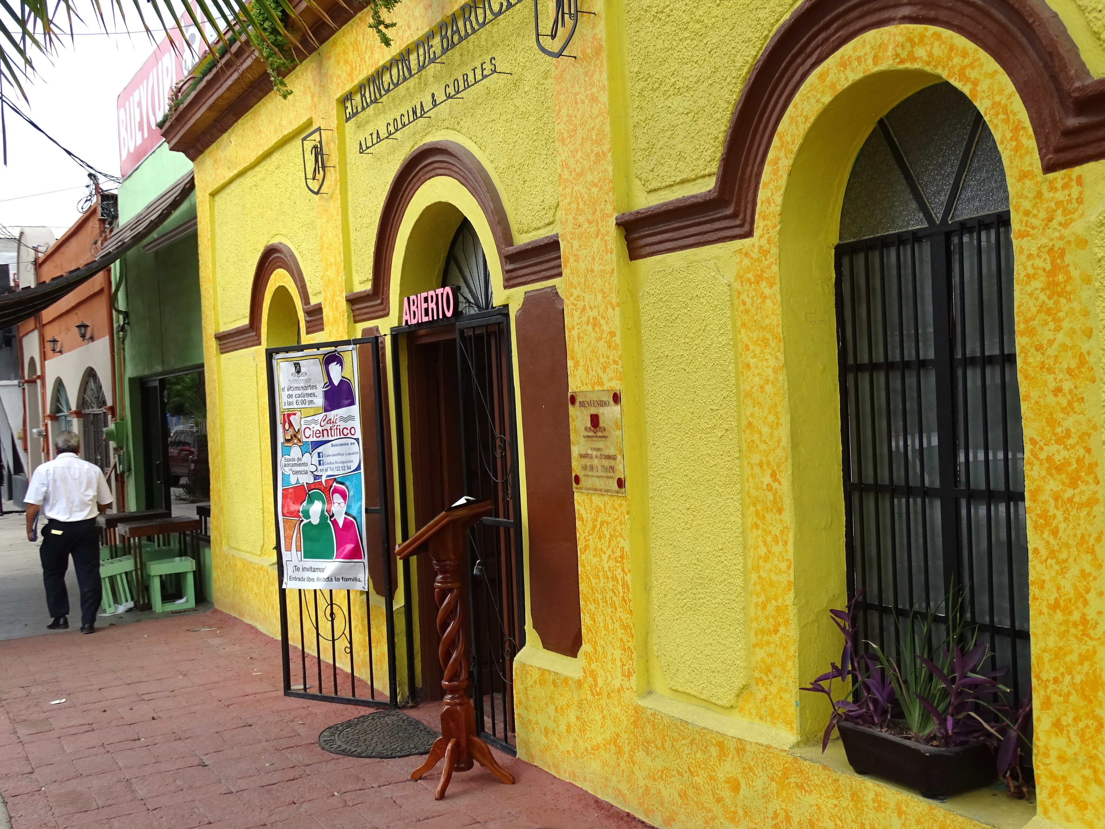 Street Scene - La Paz - Baja California Sur - Mexico - 02